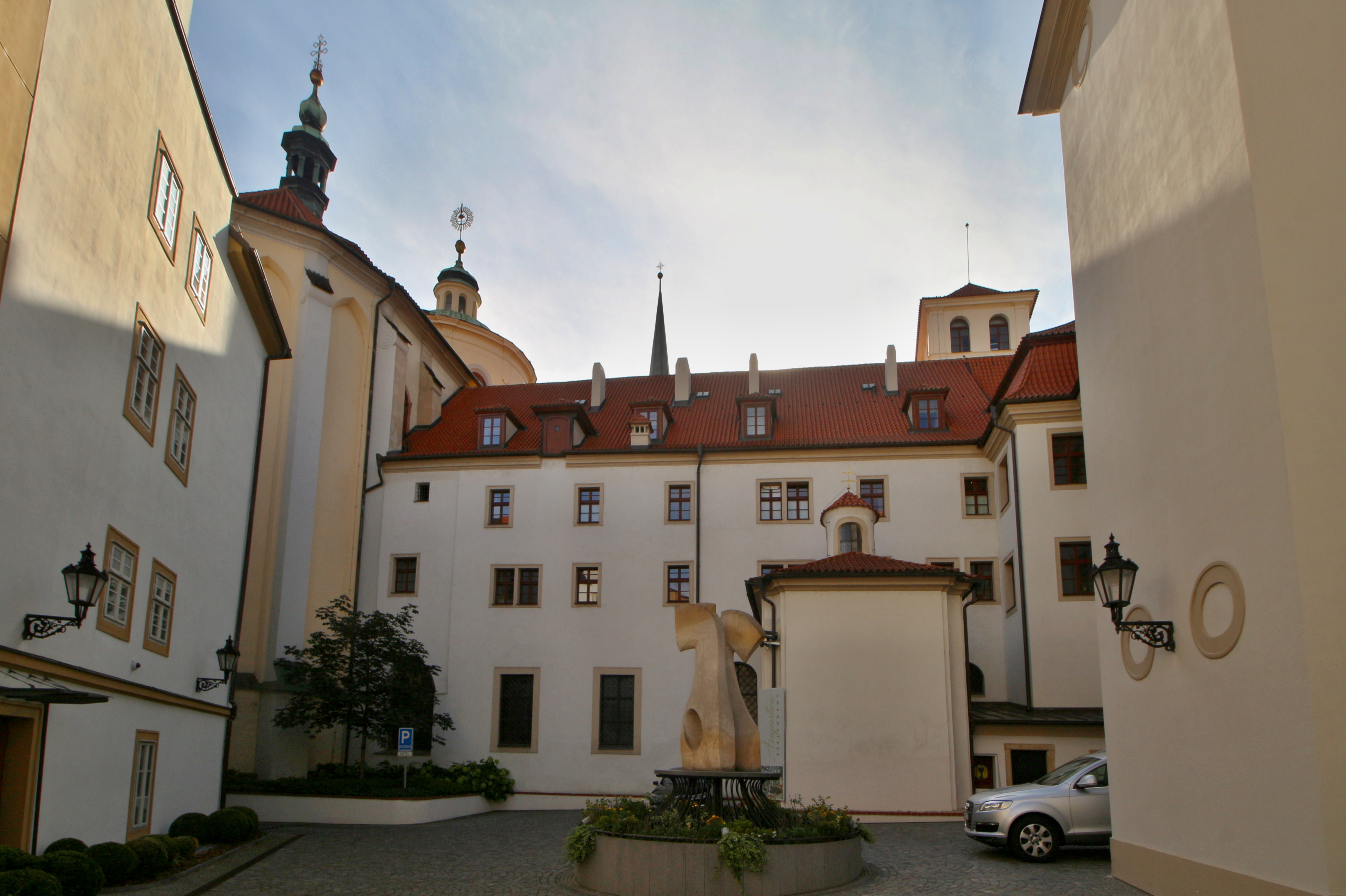 Malá Strana, klášter augustiniánů u sv. Tomáše